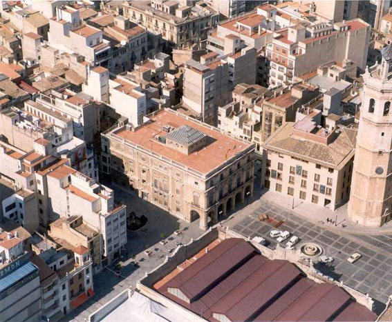 Casa Consistorial (Castellón de la Plana)